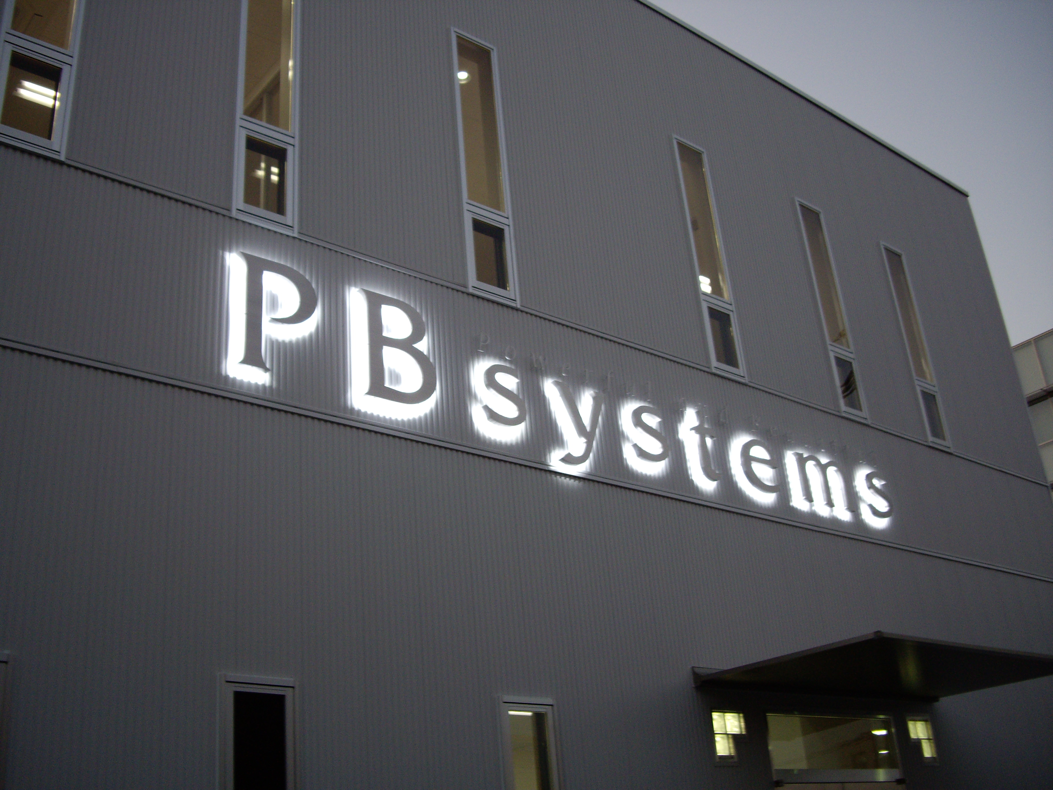 PBsystems本社外観